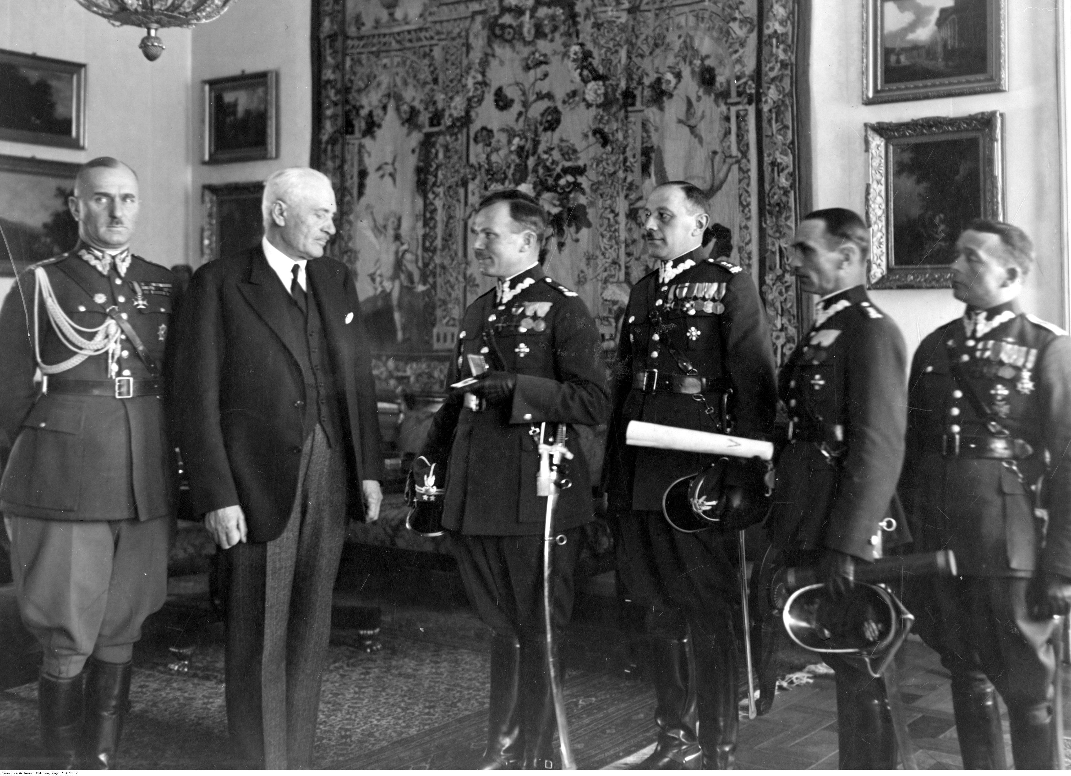 Delegacja 34 Pułku Piechoty u prezydenta RP Ignacego Mościckiego; 18 stycznia 1933. Wręczenie prezydentowi RP Ignacemu Mościckiemu odznaki pułkowej przez delegację 34 pp. Widoczni od lewej: pułkownik Jan Głogowski, Ignacy Mościcki, podpułkownik Franciszek Grabowski. Koncern Ilustrowany Kurier Codzienny - Archiwum Ilustracji. Sygnatura: 1-A-1387